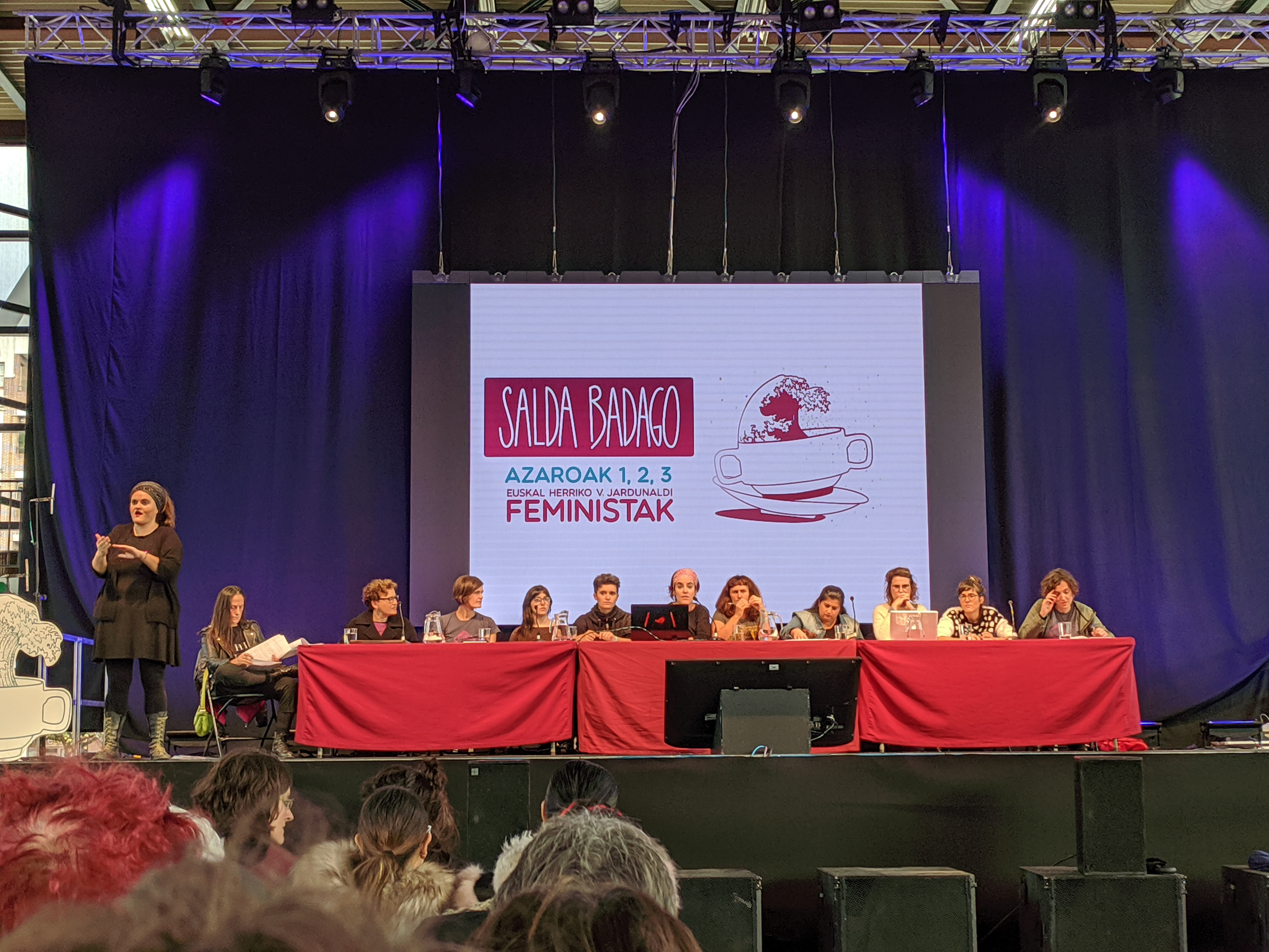 Azaroaren 3ko mahai -inguru zentrala_Mugimendu feministaren erraiak